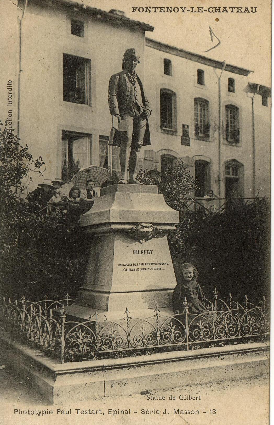 Satue de Gilbert erigée en 1898 à Fontenoy-le-Château, sculpteur Manuella, pseudo de la Duchesse d'Uzès. Photo de 1902.